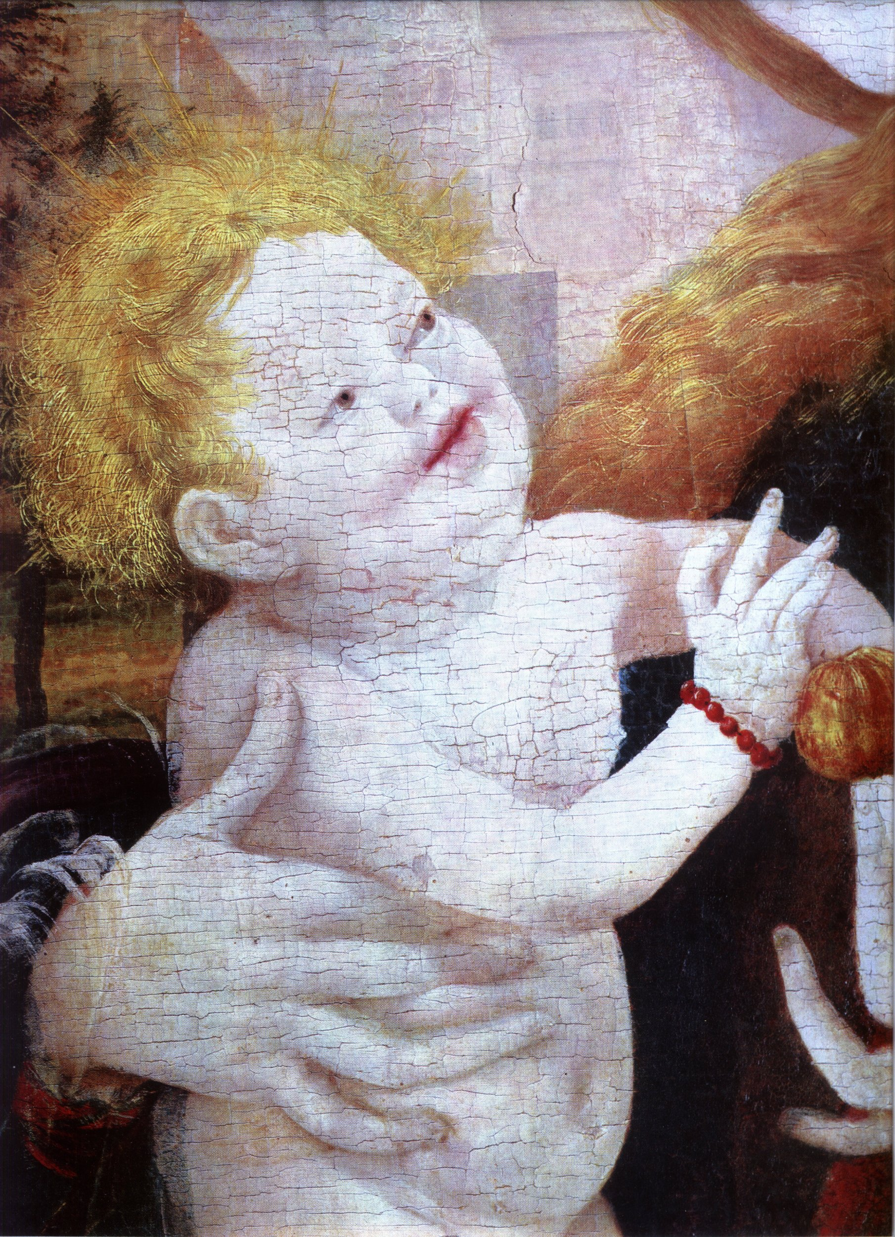 Stuppacher Madonna, Detail: Jesuskind